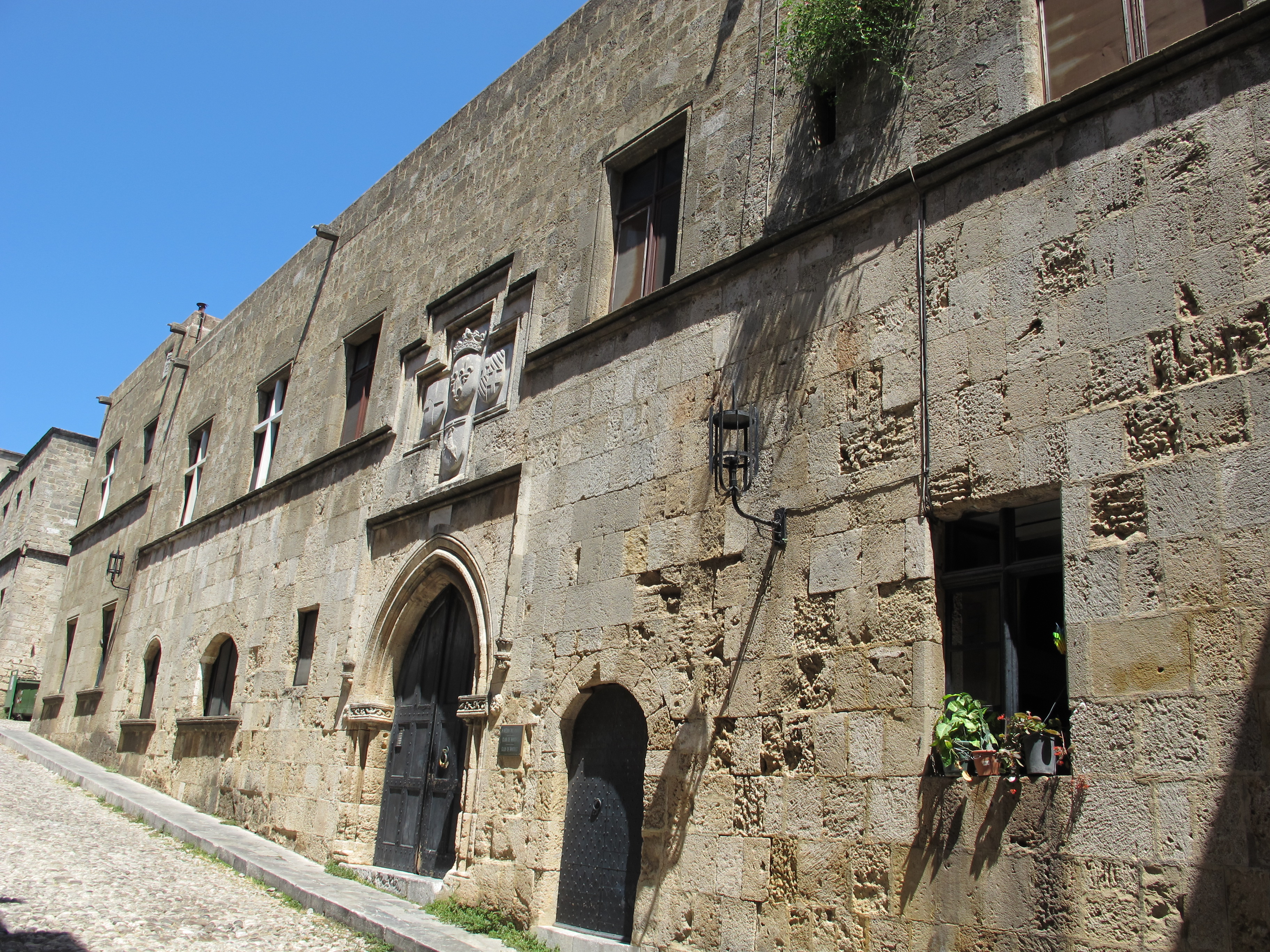 Odos Ippoton, palazzo di provenza